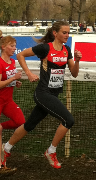 Fabienne Amrhein at the 2013 European Cross-Country Championships in Belgrade